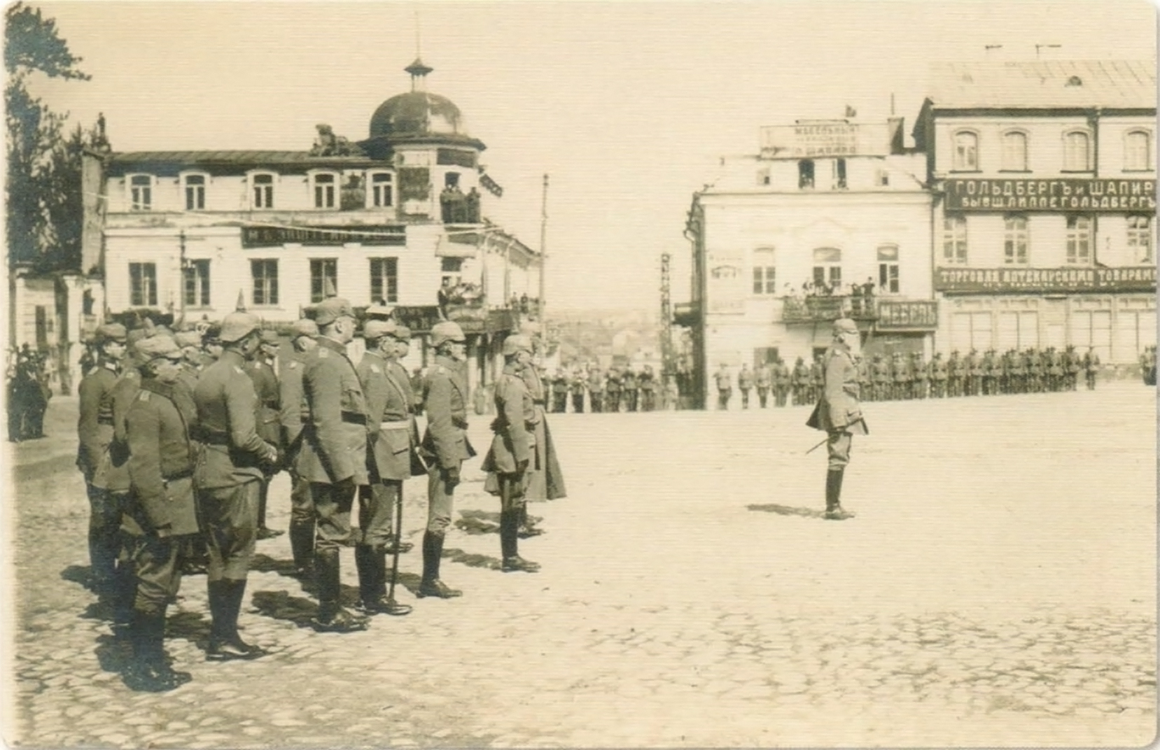 Беларуская (тарашкевіца): Менск (Miensk), рог пляцу Высокага Рынку (plac Vysoki Rynak) і вуліцы Школьнай (vulica Školnaja)